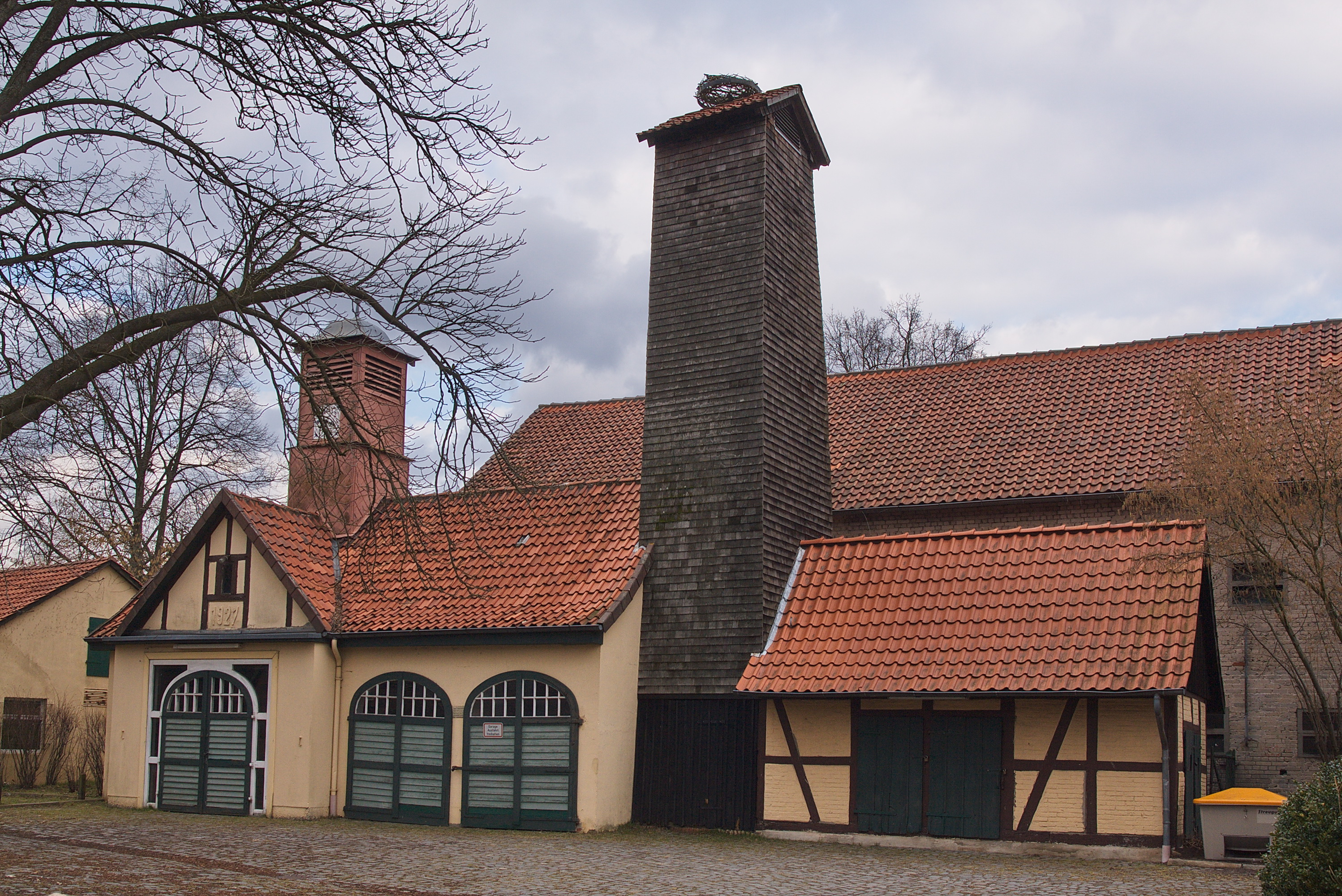 Feuerwehr in Otze (Burgdorf), Niedersachsen, Deutschland.